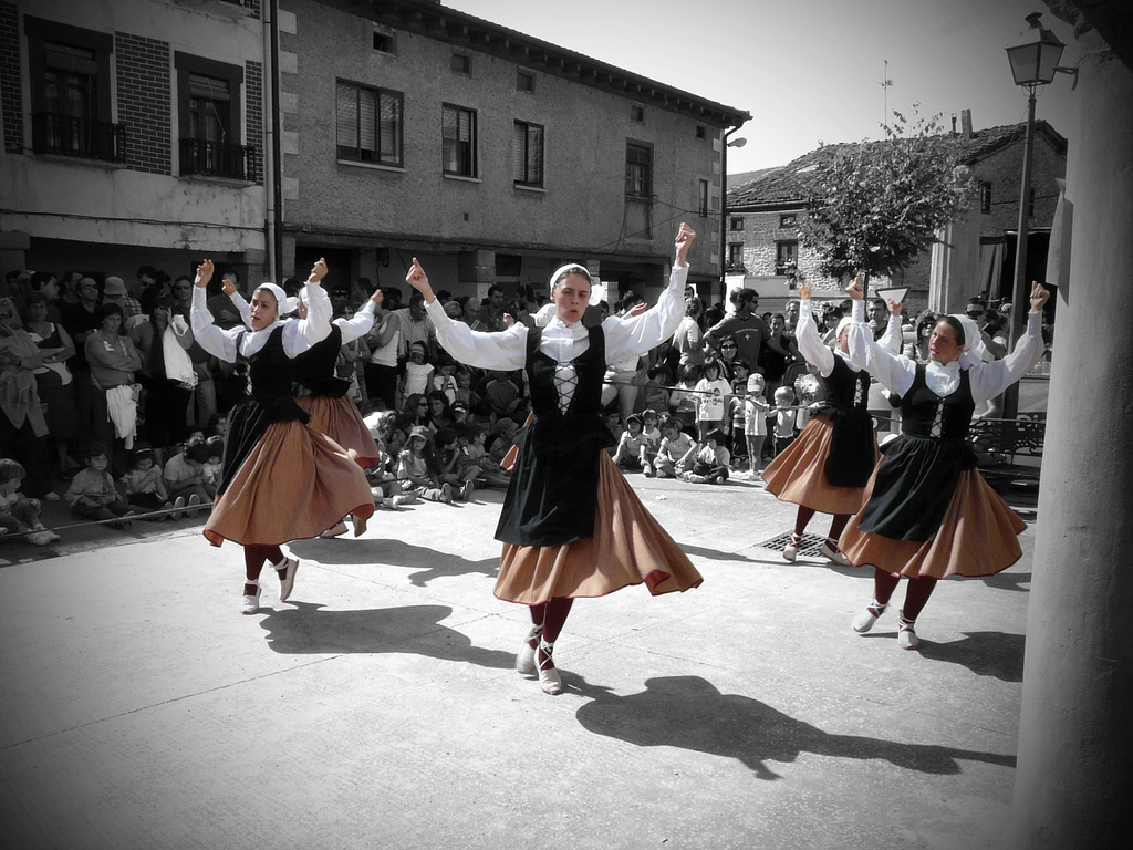 Euskara Añanan jaia, 2008, Armiñon